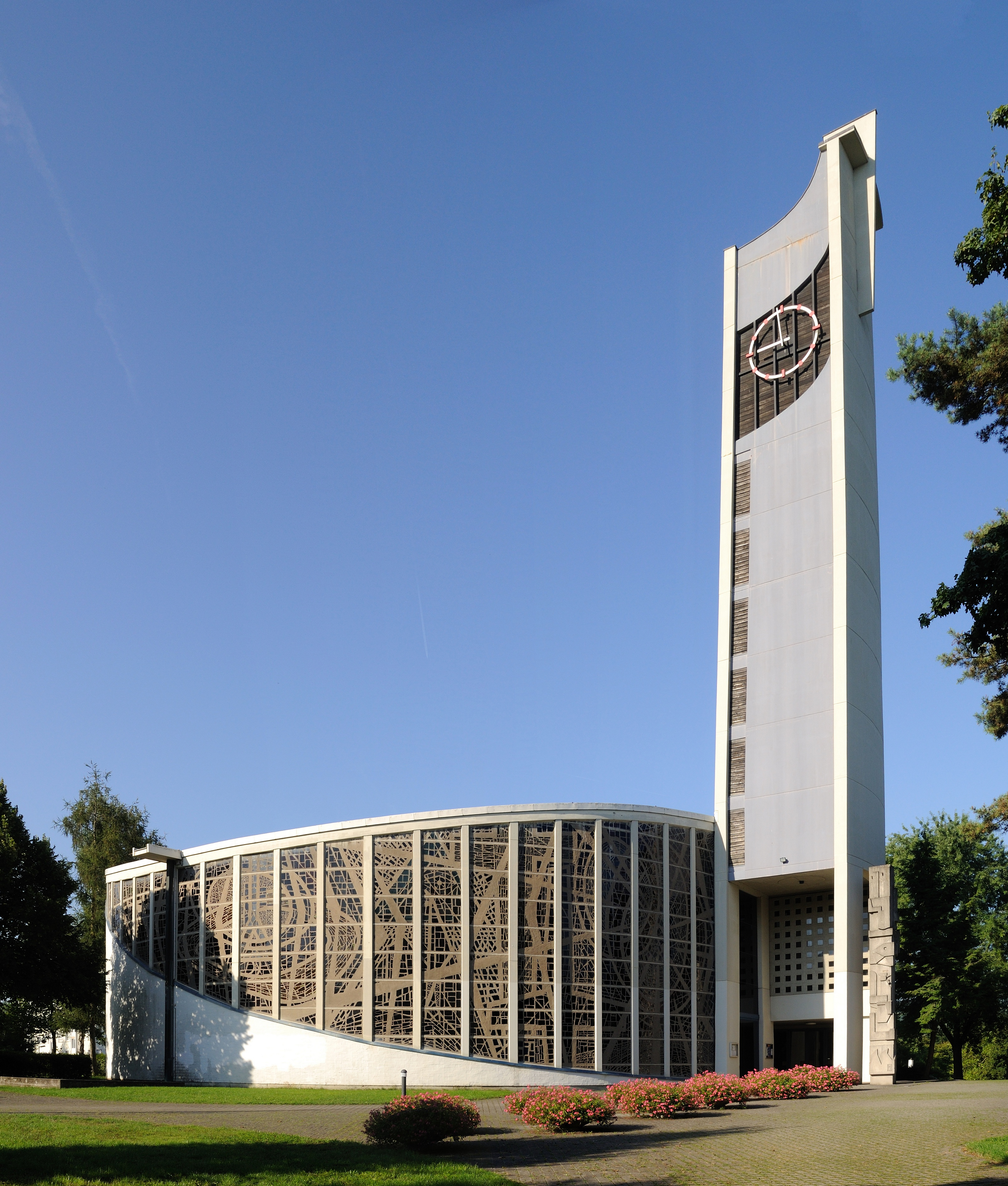 Lörrach: St. Peter (Nordostansicht)